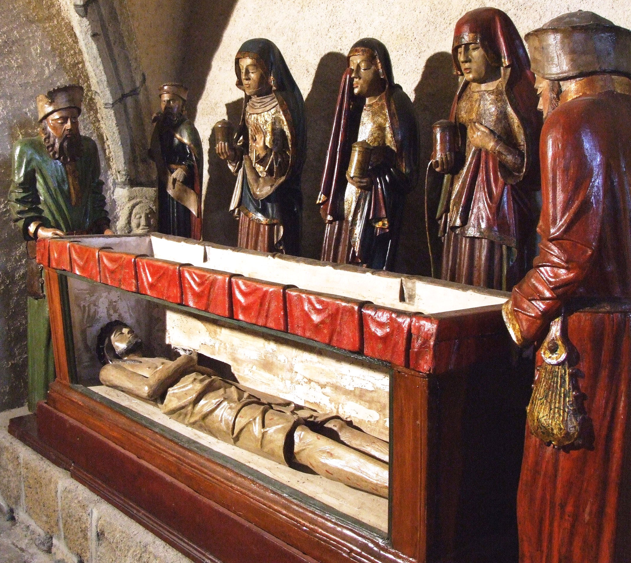 Aubazat - Eglise Saint-Roch - Mise au tombeau